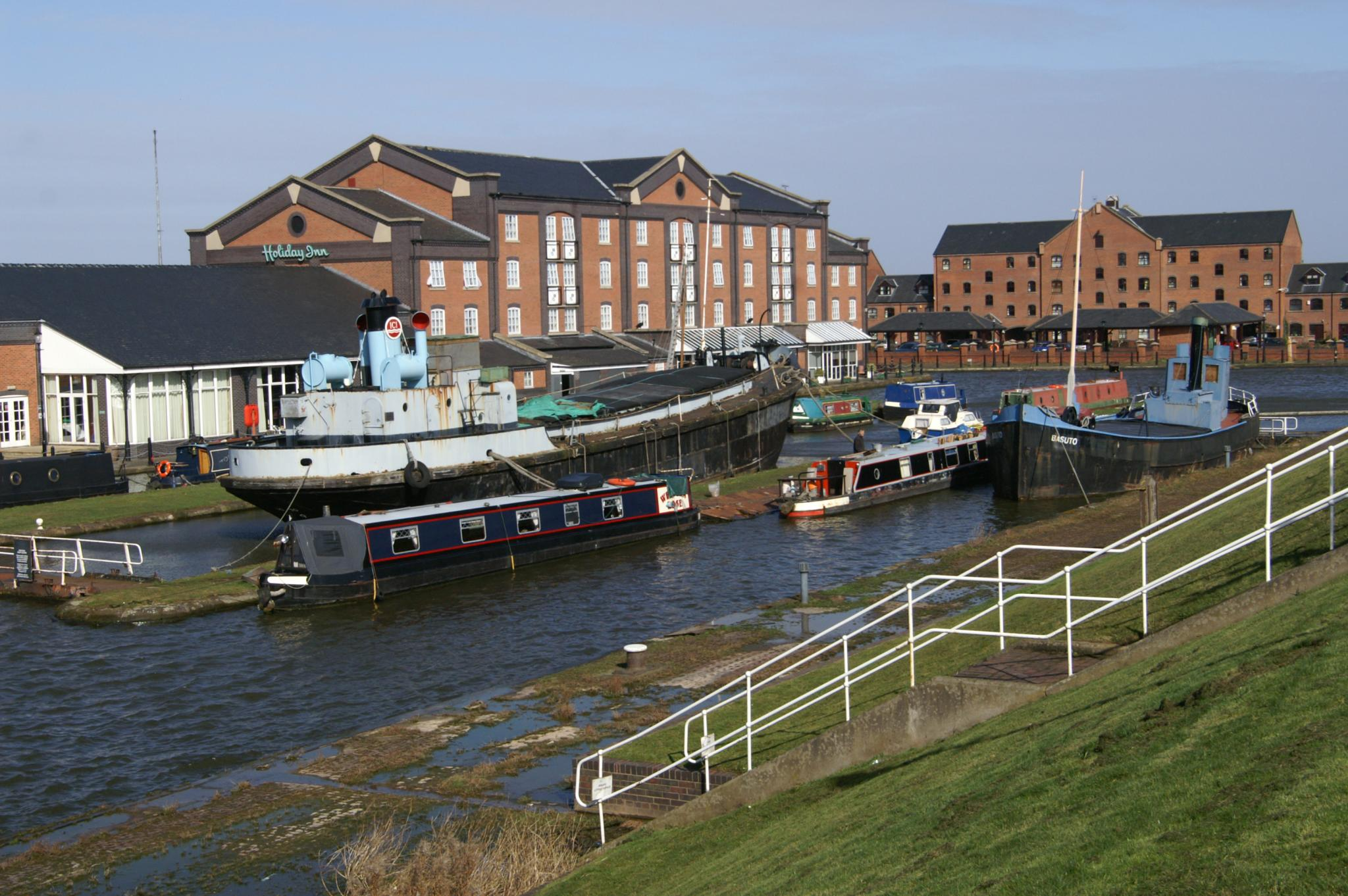 Ellesmere Port, Cheshire